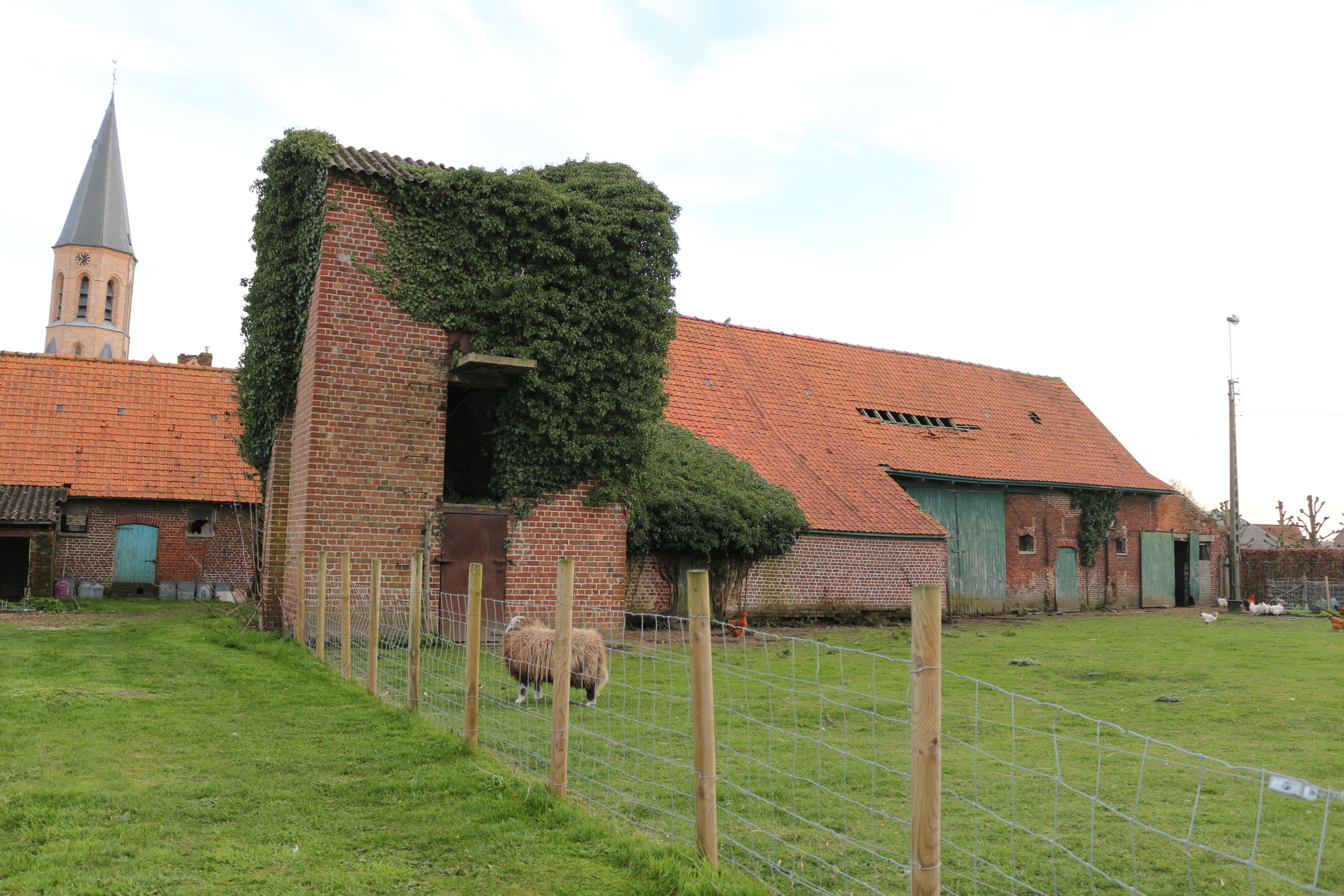 Tabaksast op de site